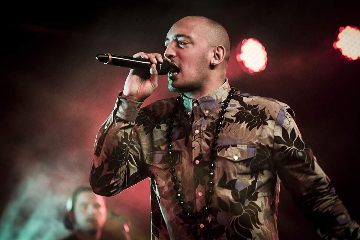 Wafande ved Copenhagen Dancehall i Øksnehallen, København den 5/4-14